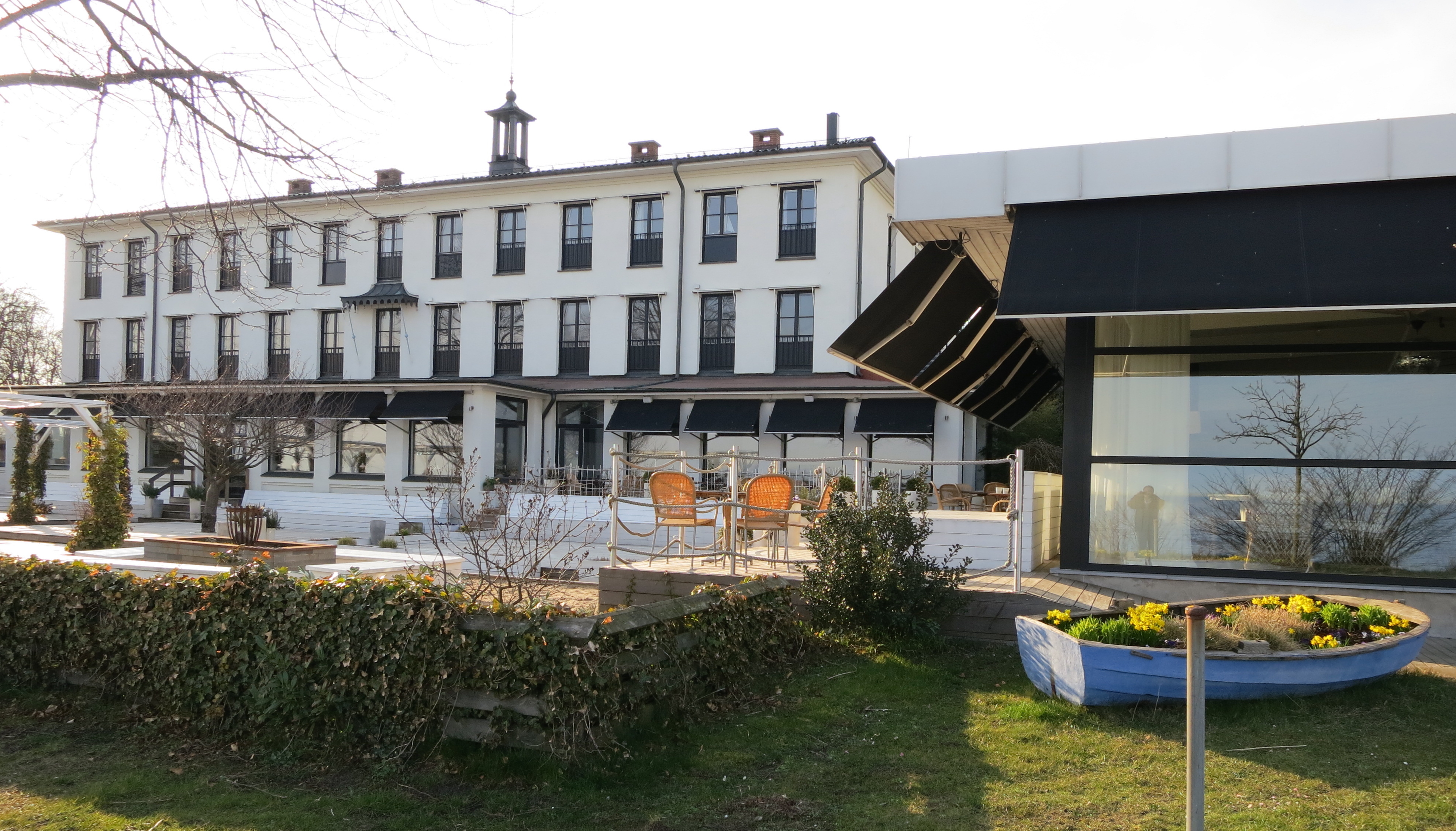 Hotell Saltsjöbaden, Ystad